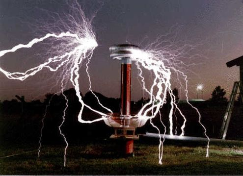 ولتاژ بالا منجر به شکست هوا و تخلیه ی الکتریکی شده است